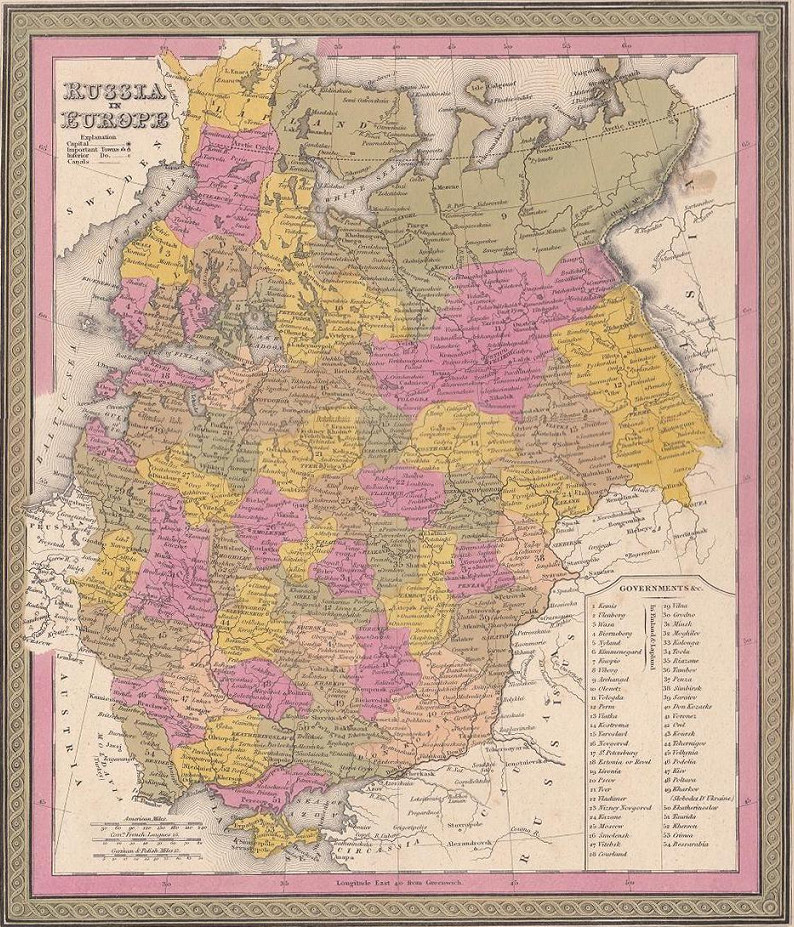 Карта Европейской части России, опубликованная Самуэлем Митчелом в 1846 году.